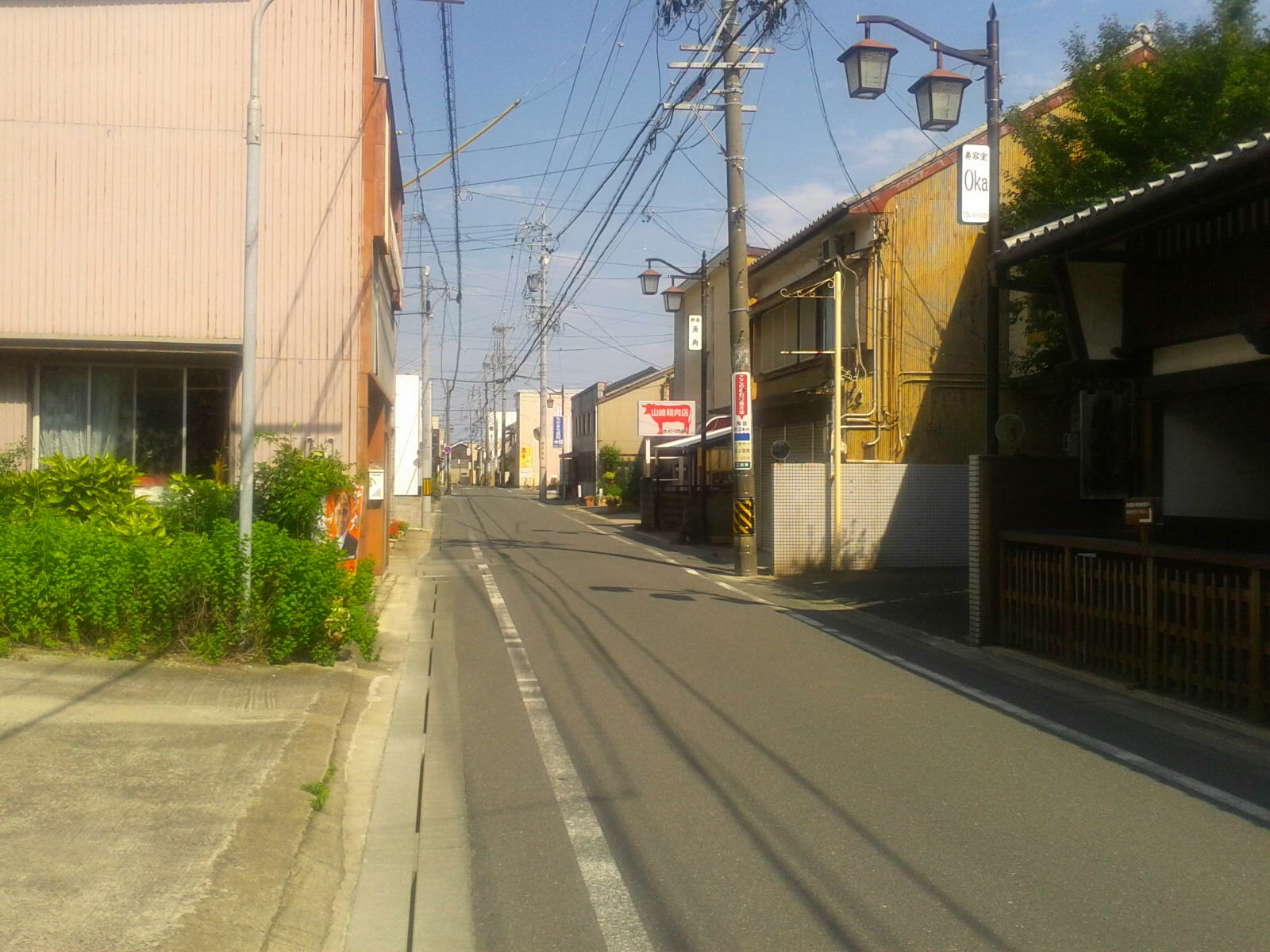 二川 町並み